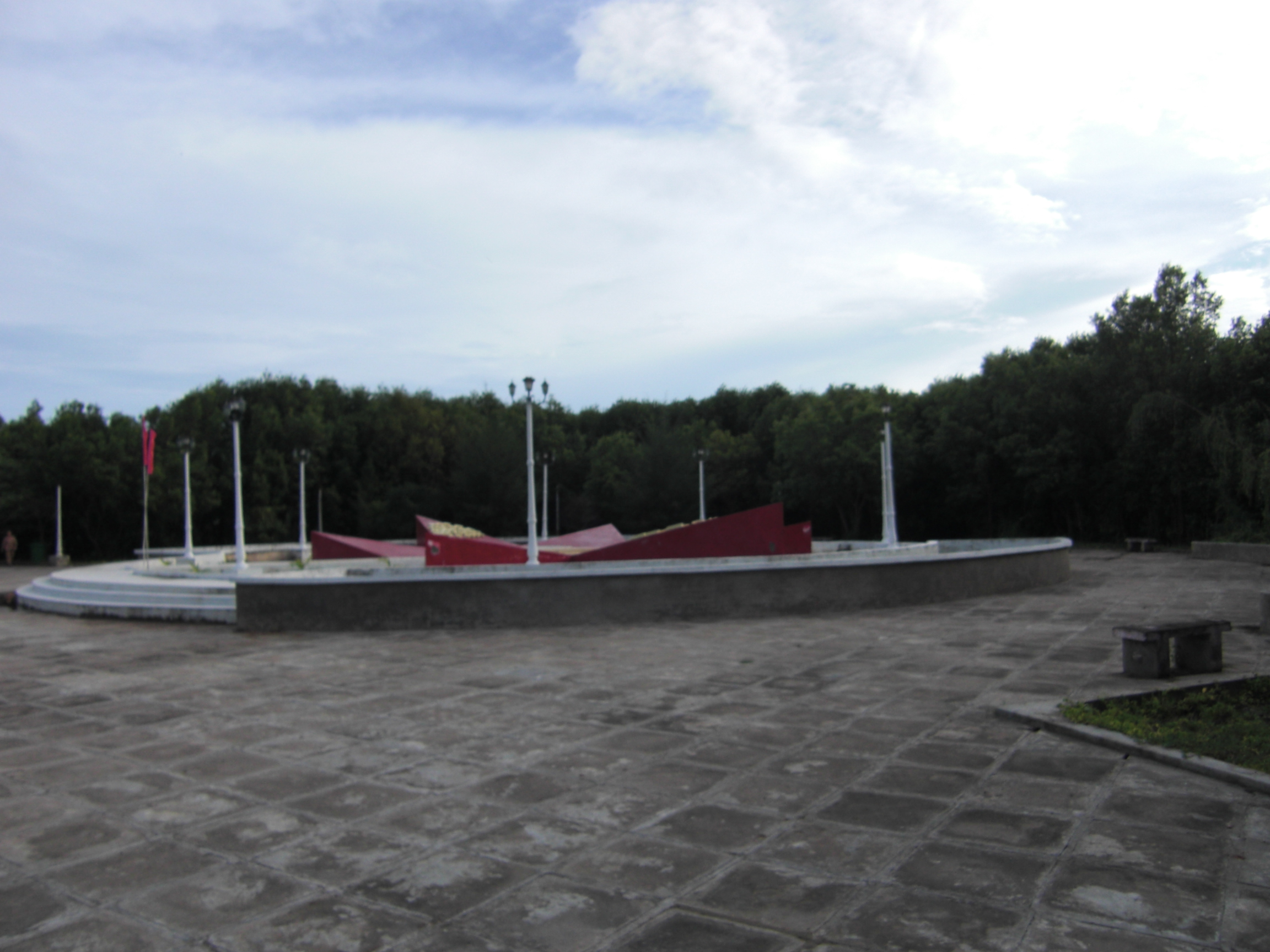 Mốc tọa độ quốc gia GPS 0001, toàn cảnh